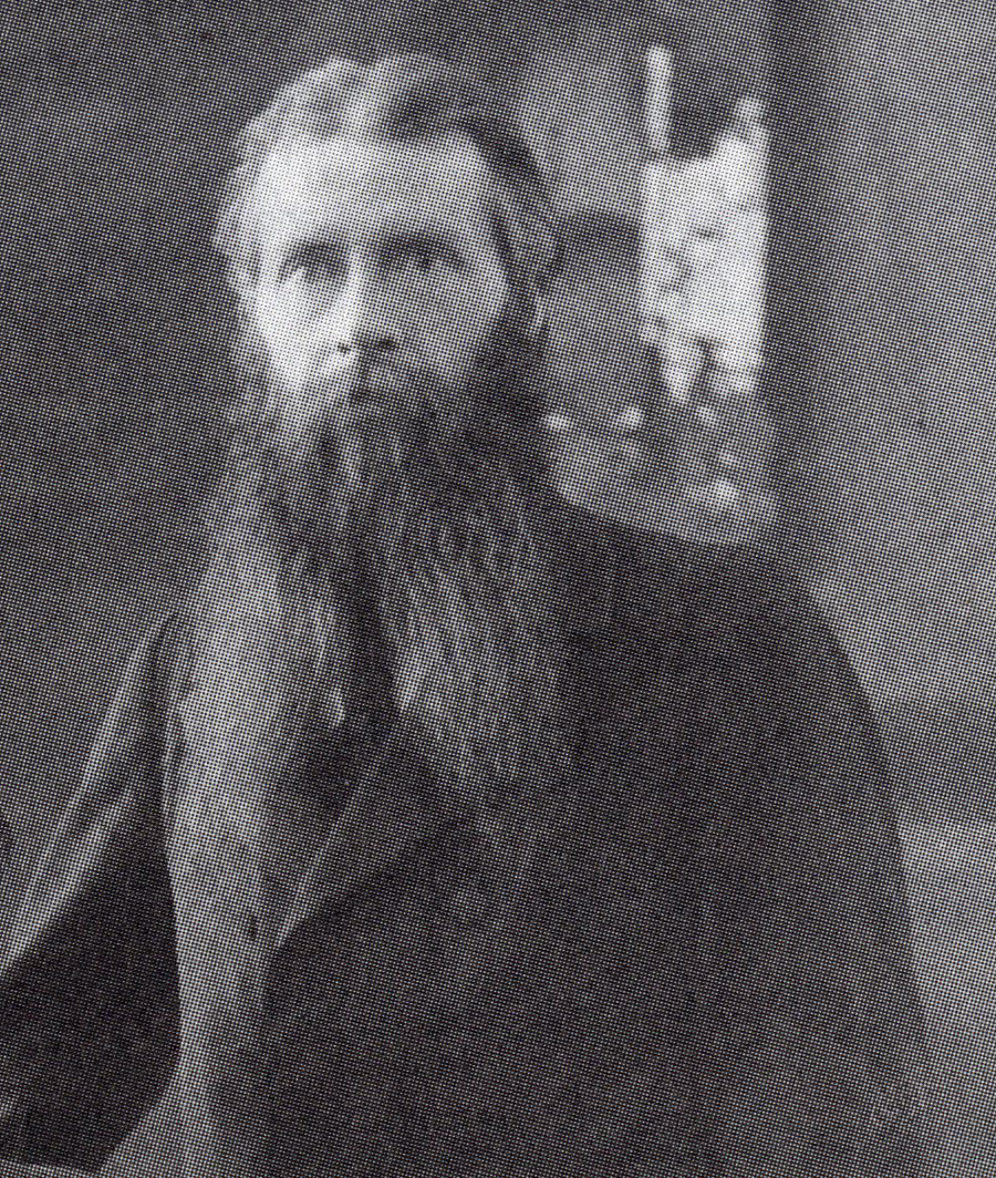 Portret van Louis Adriën Bähler (1867-1941)